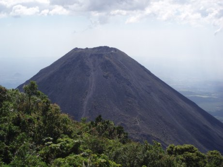 Izalco volcano in El Salvador.